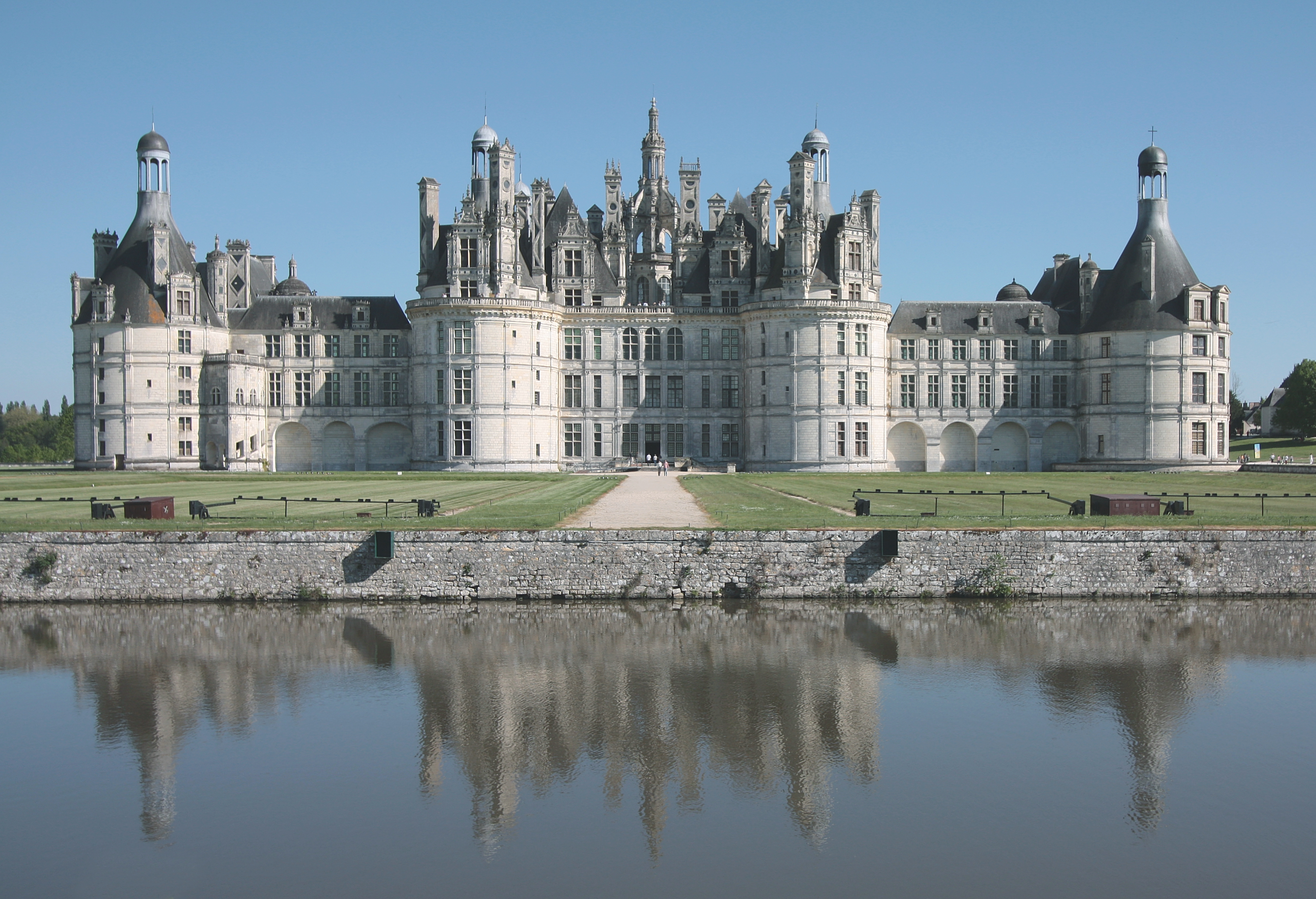 Schloss Chambord im Département Loir-et-Cher/Frankreich - Parkseite